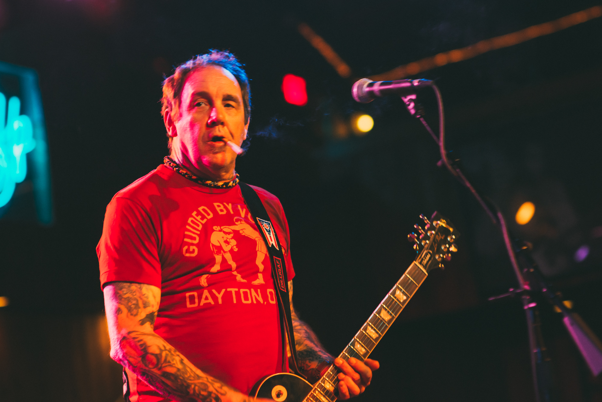 Guided by Voices tijdens een optreden in de Belly Up Tavern in San Diego (Californië)